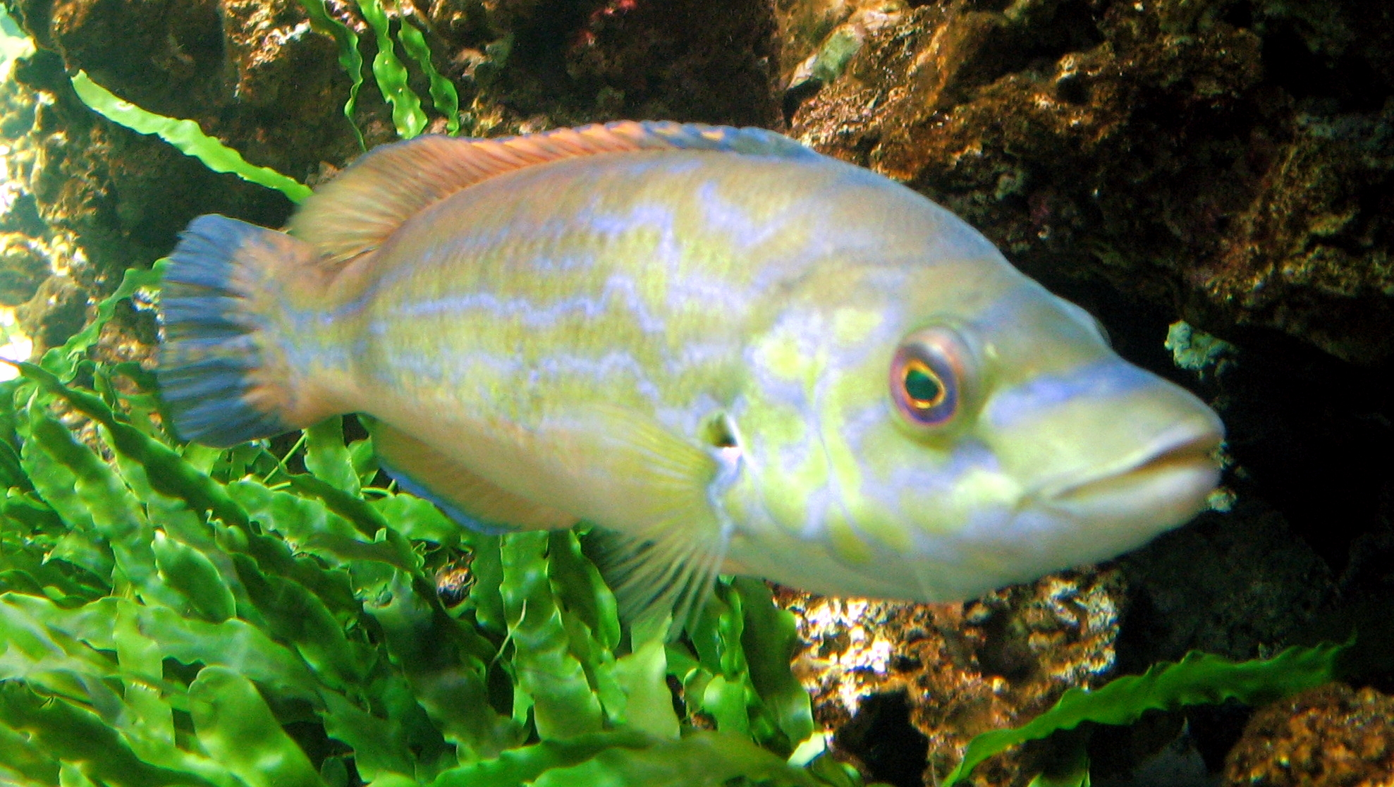 Labrus mixtus in Aquarium Cinéaqua Map: 48° 51' 44" N 2° 17' 27" E